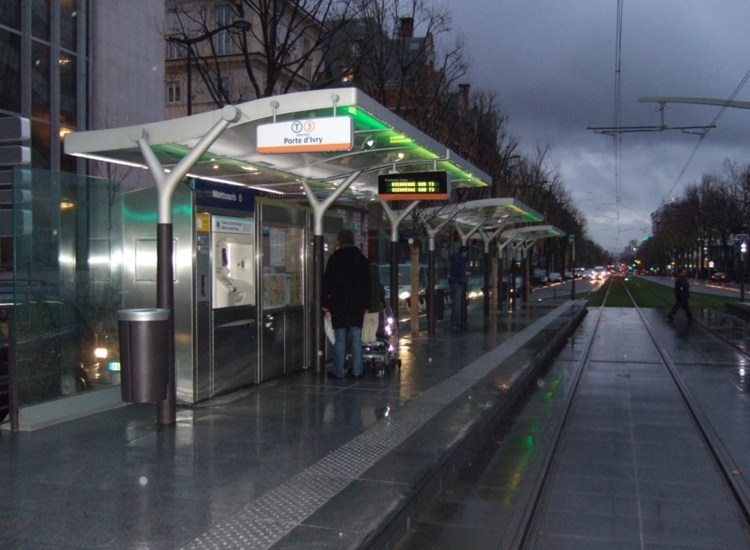 Station Montsouris de la ligne 3 du tramway parisien.